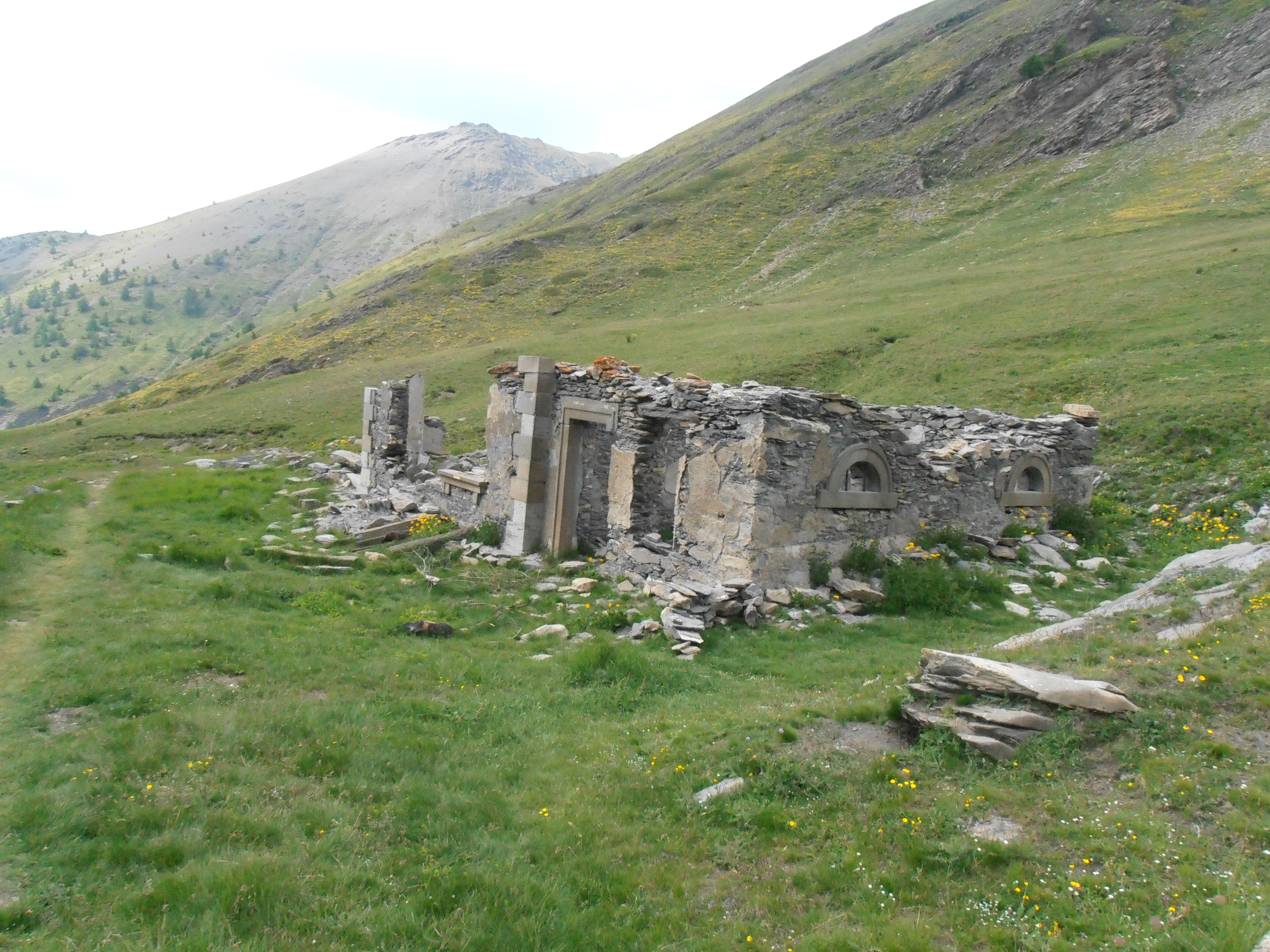 Le refuge Napoleon en ruine au col Lacroix.